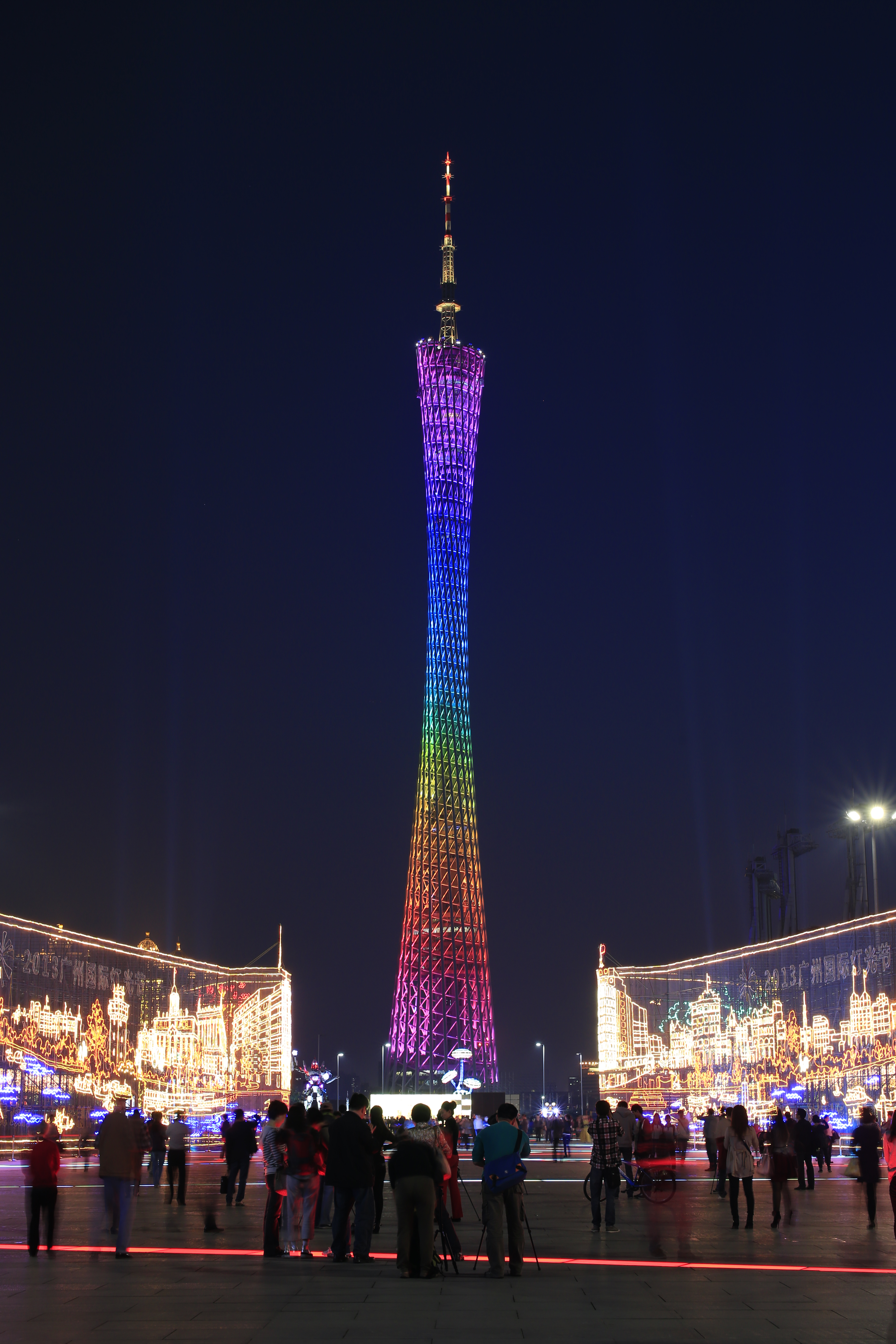 广州塔